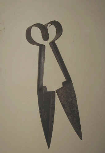 Škarje za striženje ovac, slikane v rojstni hiši Jalna, Rodine, Gorenjska